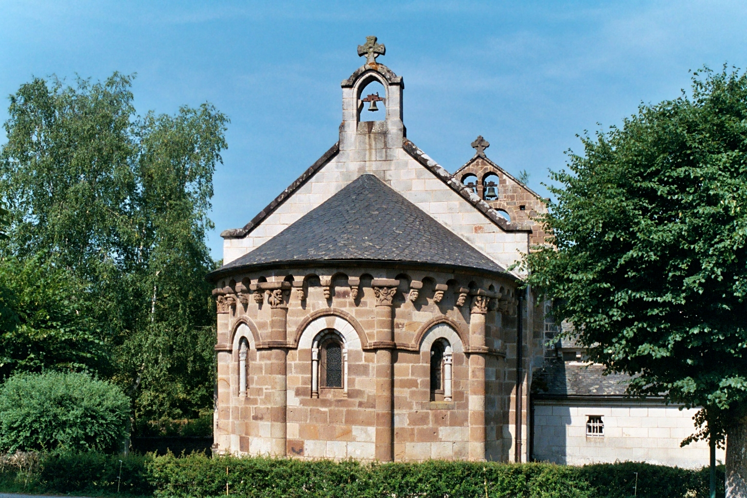 France - Auvergne - Cantal - Église Saint-Georges d'Ydes-Bourg